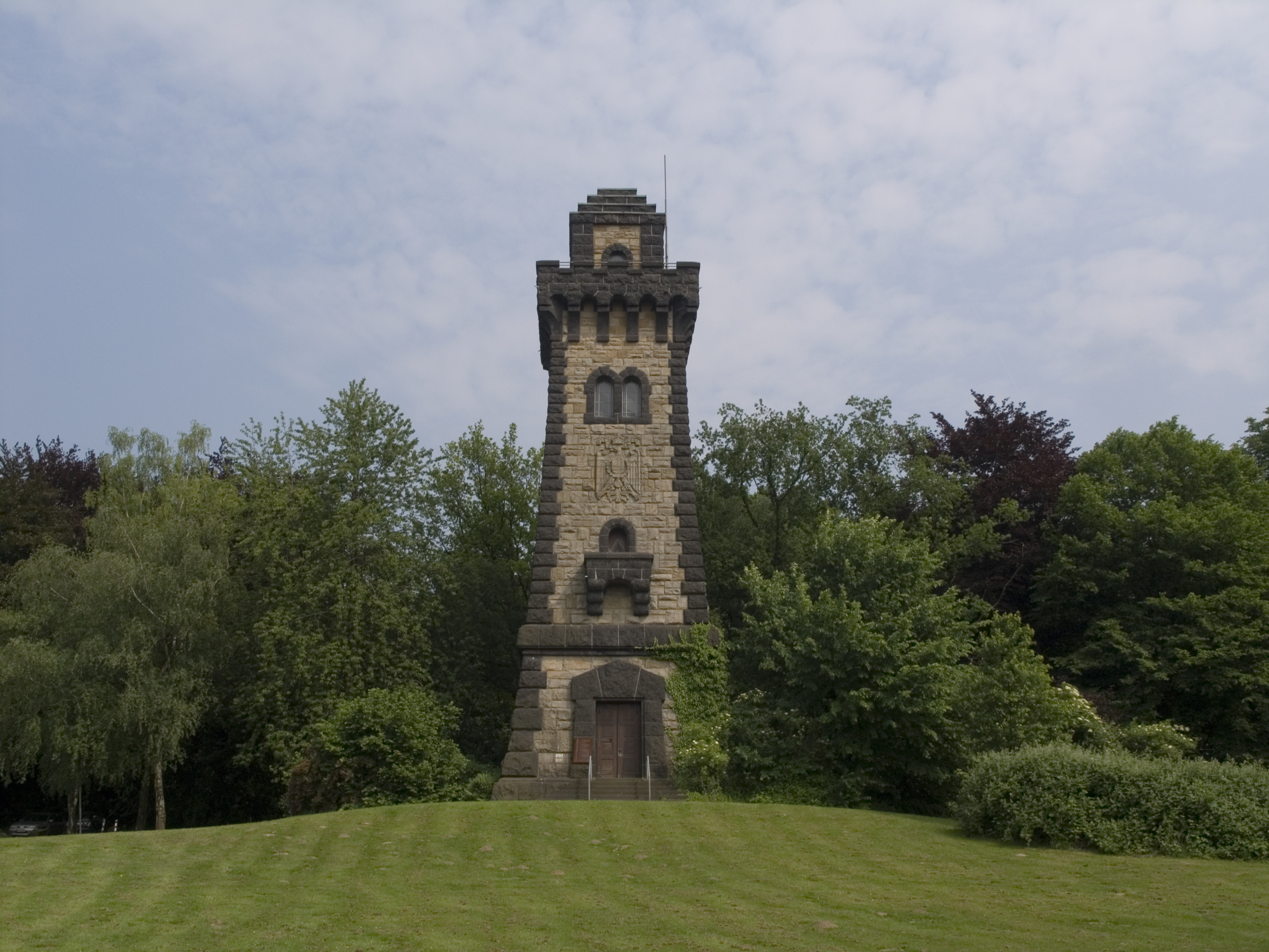 Северный Рейн-Вестфалия, Мюльхайм-на-Руре - башня Бисмарка